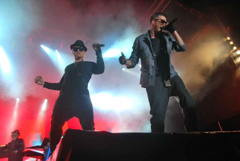 Niclas Petersen (tv.) og Jannik Thomsen (th.) under Nik & Jay-koncert på Vig Festival 2010.